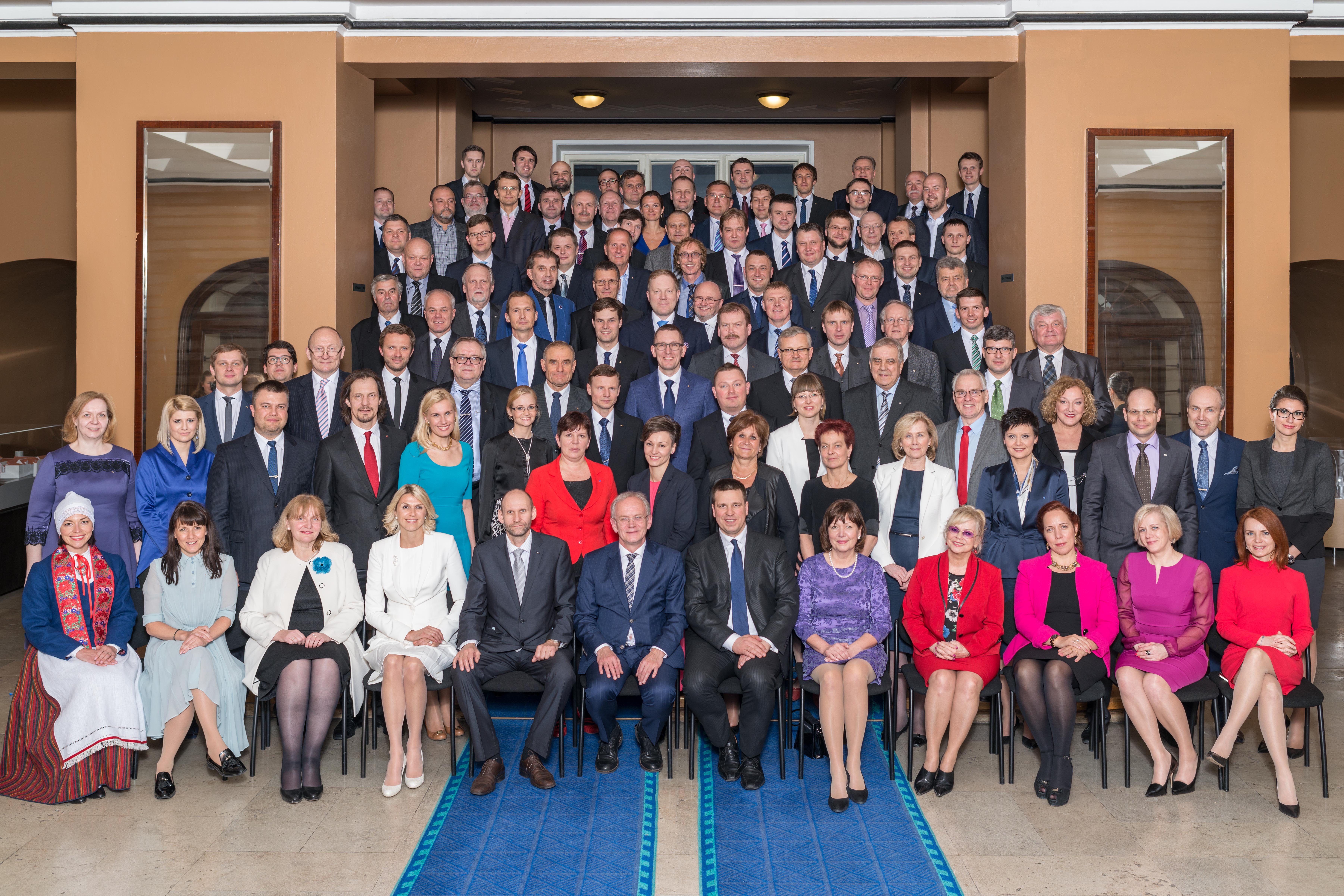 XIII Riigikogu 30. märts 2015